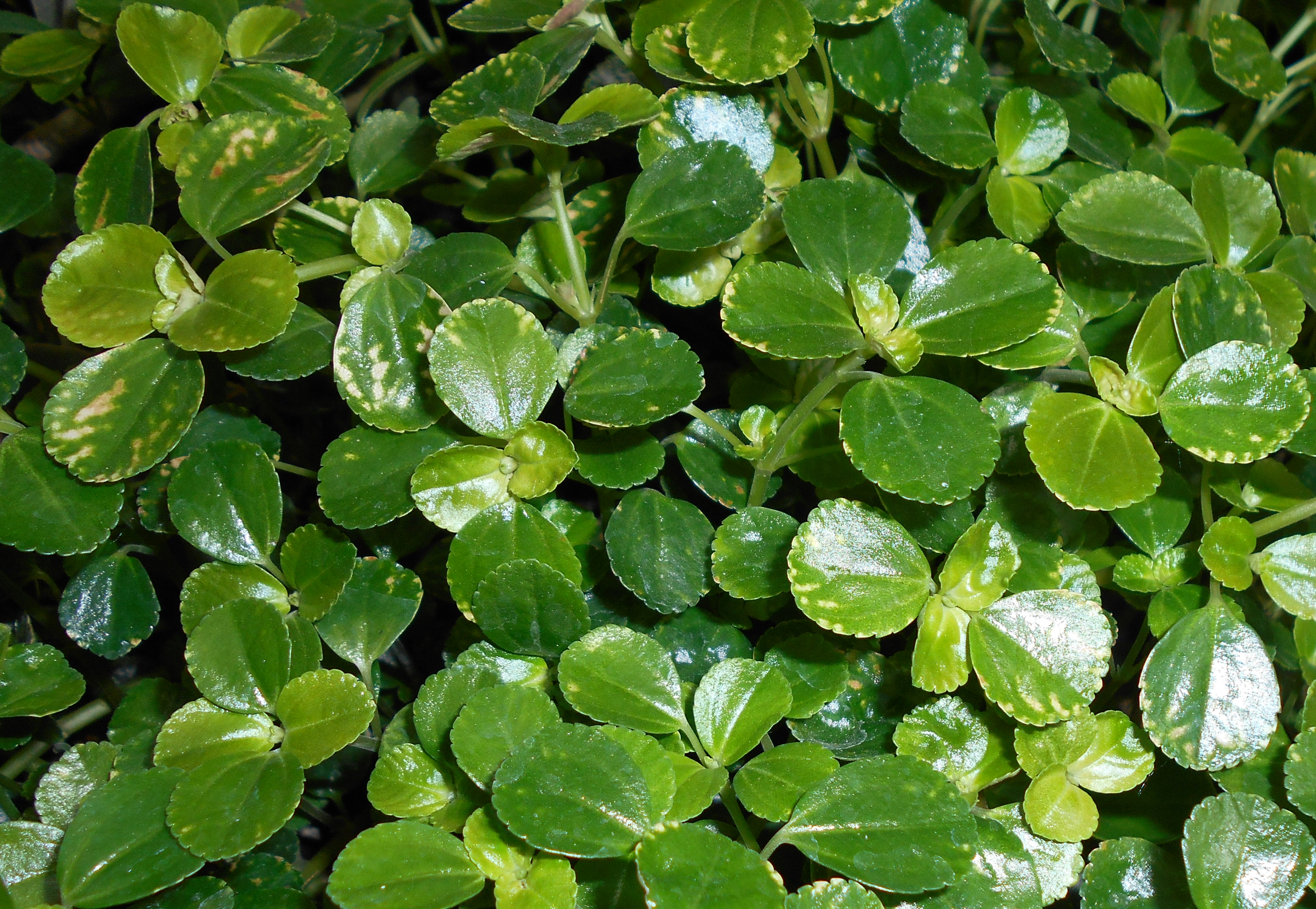 Pilea depressa?, Ogród Botaniczny UMCS w Lublinie.